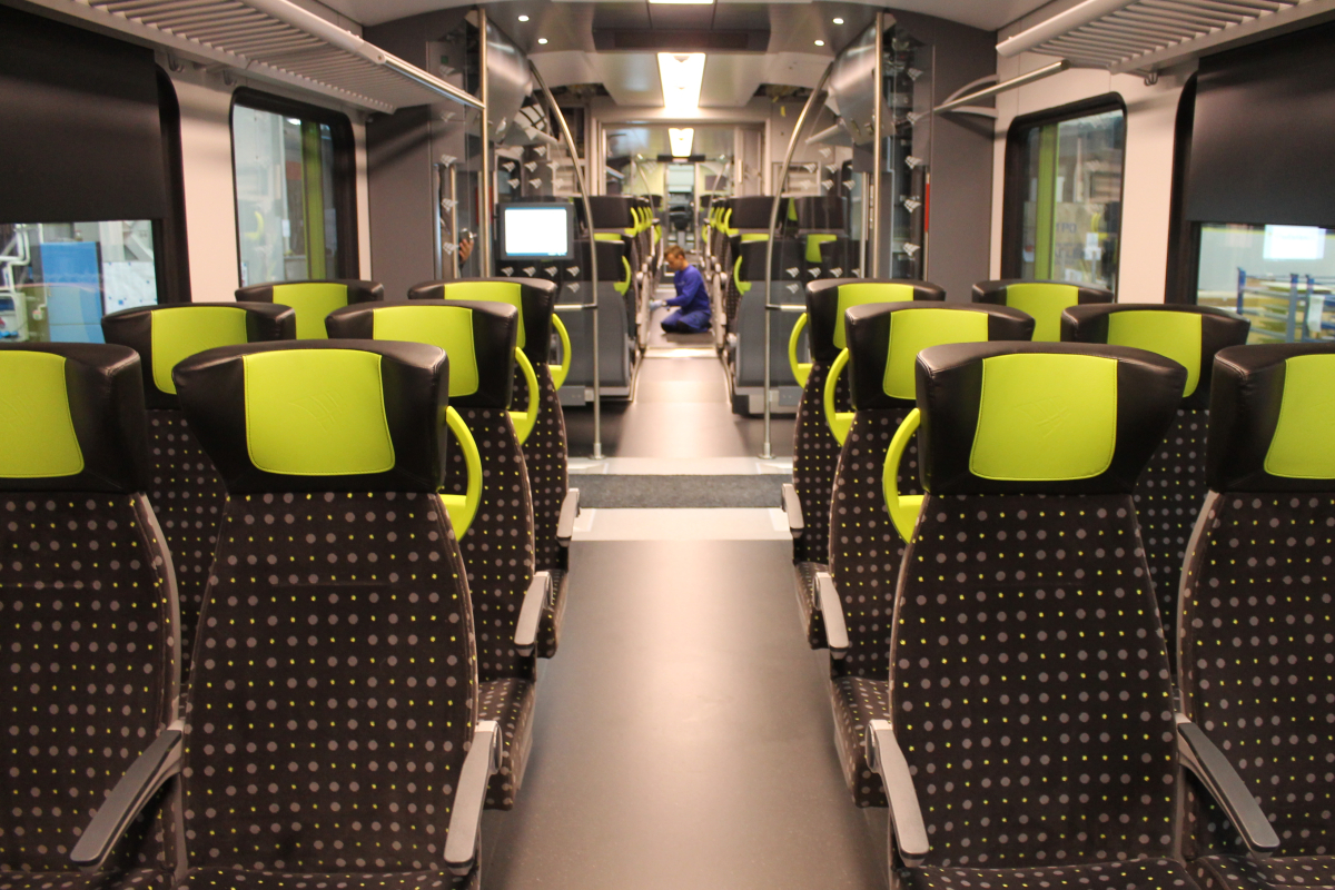 Przedział 2. klasy w pojeździe Stadler FLIRT3 dla BeNEX na terenie zakładu Stadler Polska w Siedlcach. This photo was taken during Railway Wikiexpedition 2014 set up by Wikimedia Polska Association in cooperation with Fundacja Grupy PKP. You can see all photographs in category Wikiekspedycja kolejowa 2014.